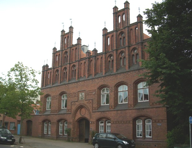 Gasthaus zum Ritter Sankt Jürgen. Osterende 18 in Husum